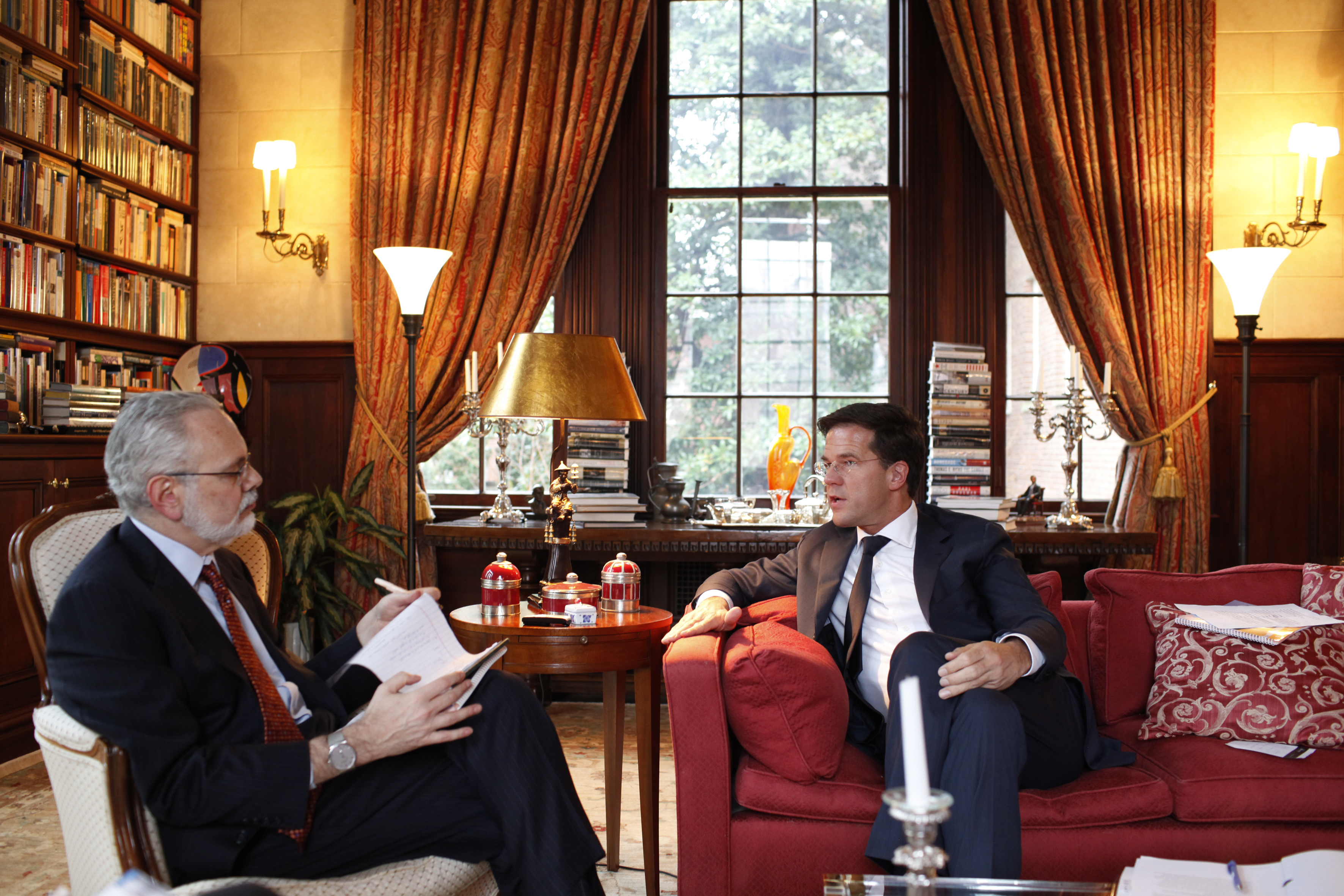 Minister-president Rutte staat in de residentie van de Nederlandse ambassadeur een journalist van The Wall Street Journal te woord. Lees meer over het bezoek aan de Verenigde Staten